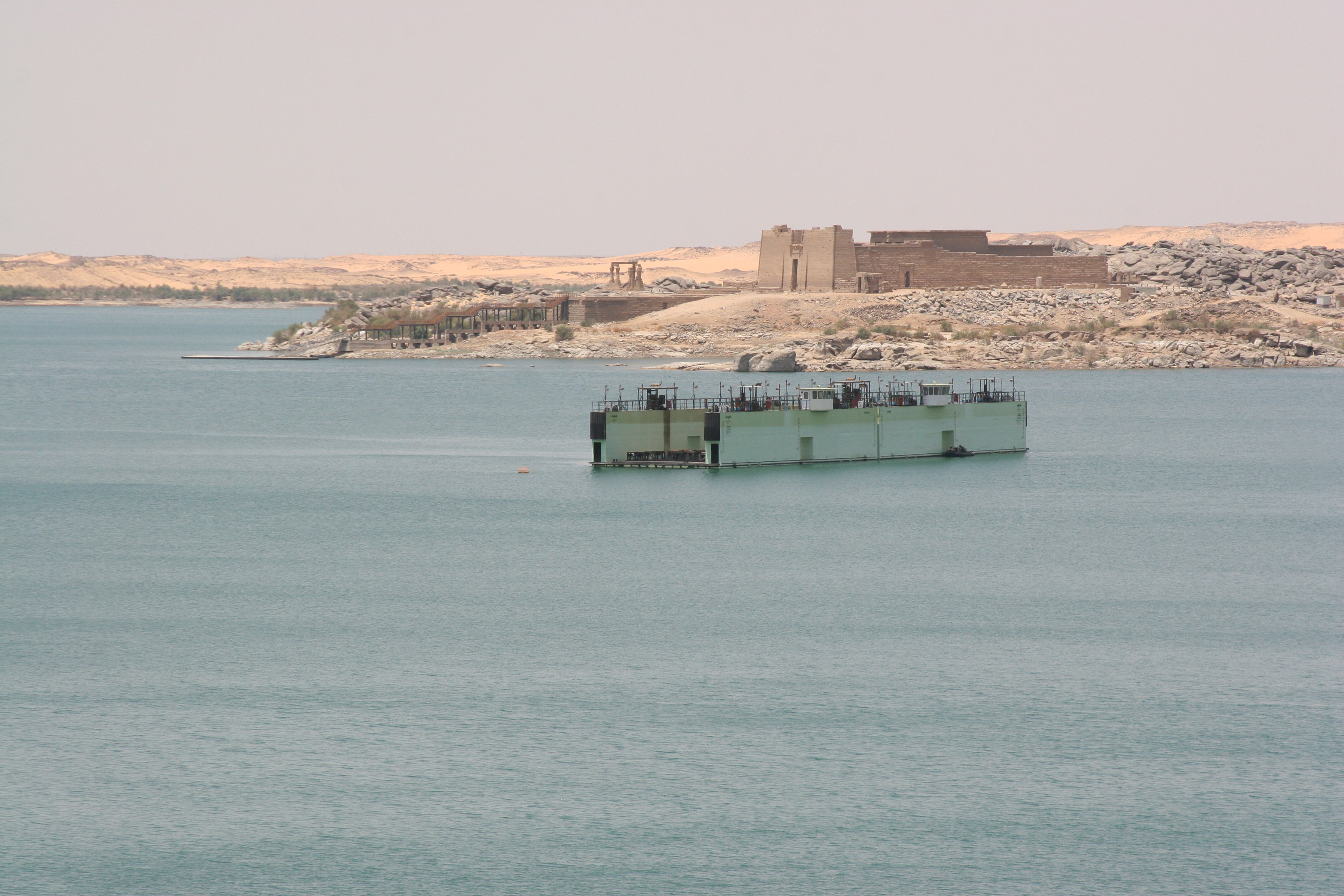 Kalabsha temple on Lake Nasser